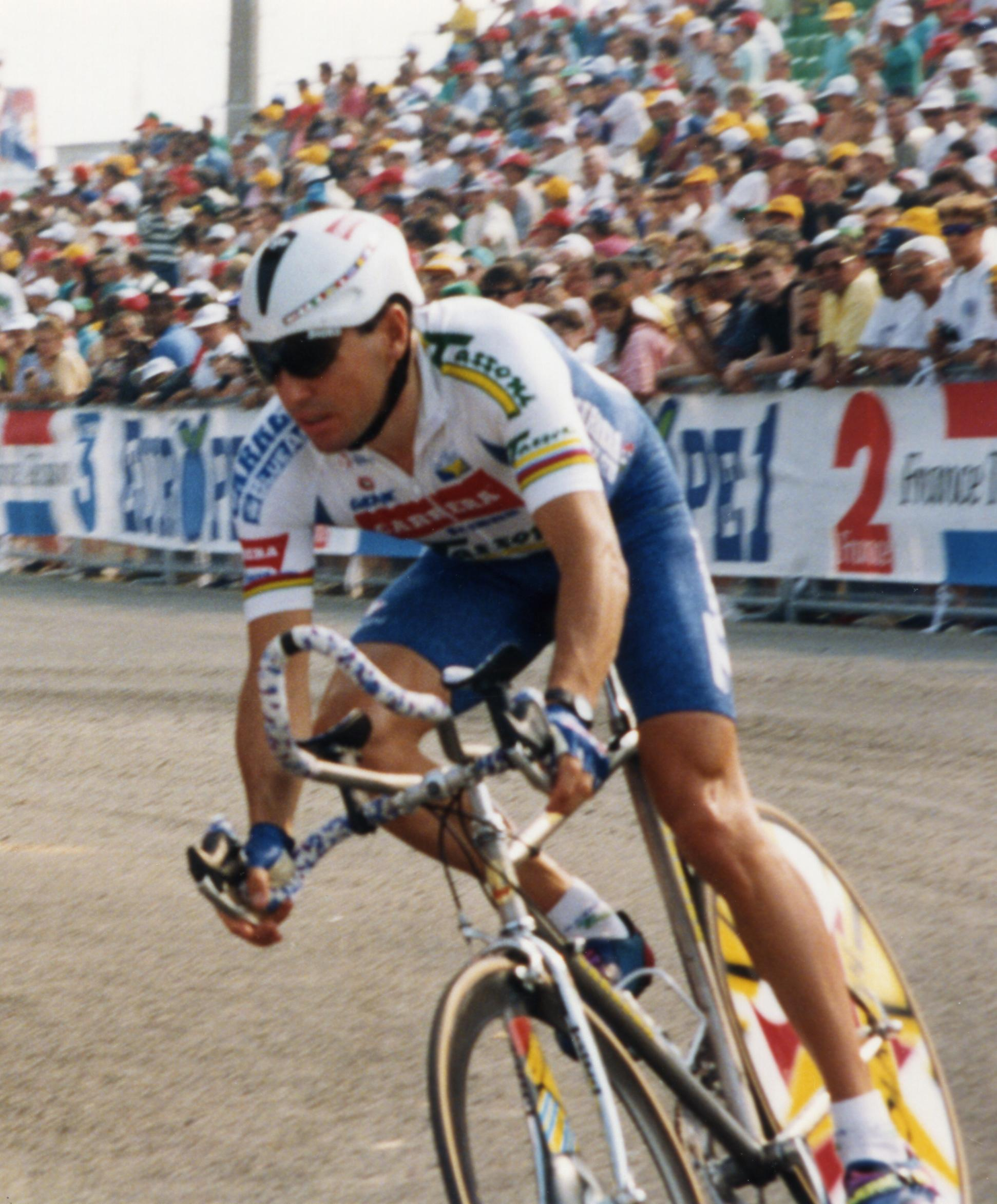 TOUR DE FRANCE 1993